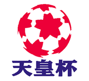 The logo of the emperor's cup transparent on PNG format.